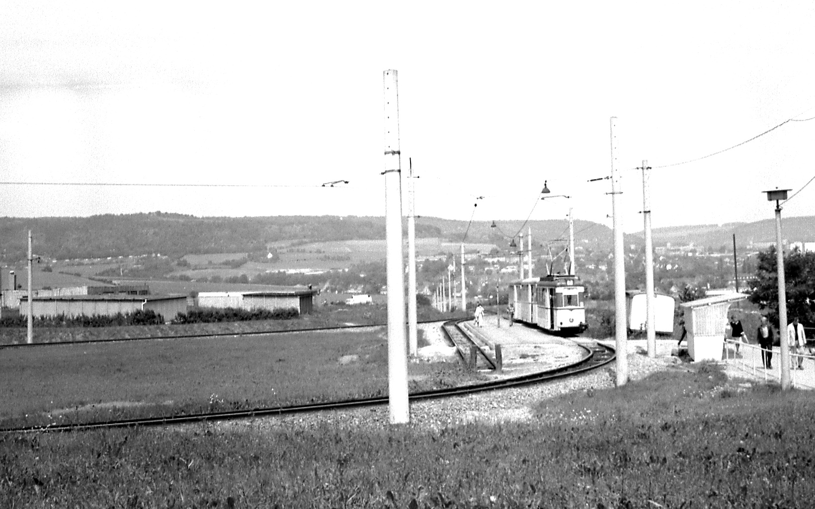 Die 1969 in Betrieb genommene, erste Wendeschleife in Jena-Winzerla im Sommer 1979